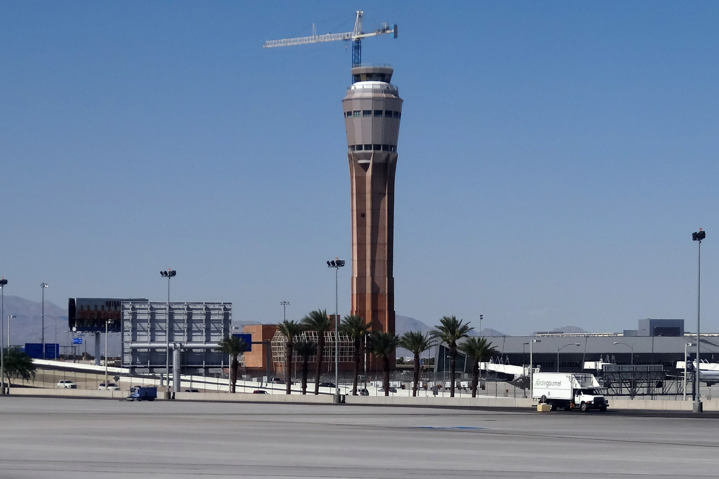 LAS LAS VEGAS TOWER CONTROL